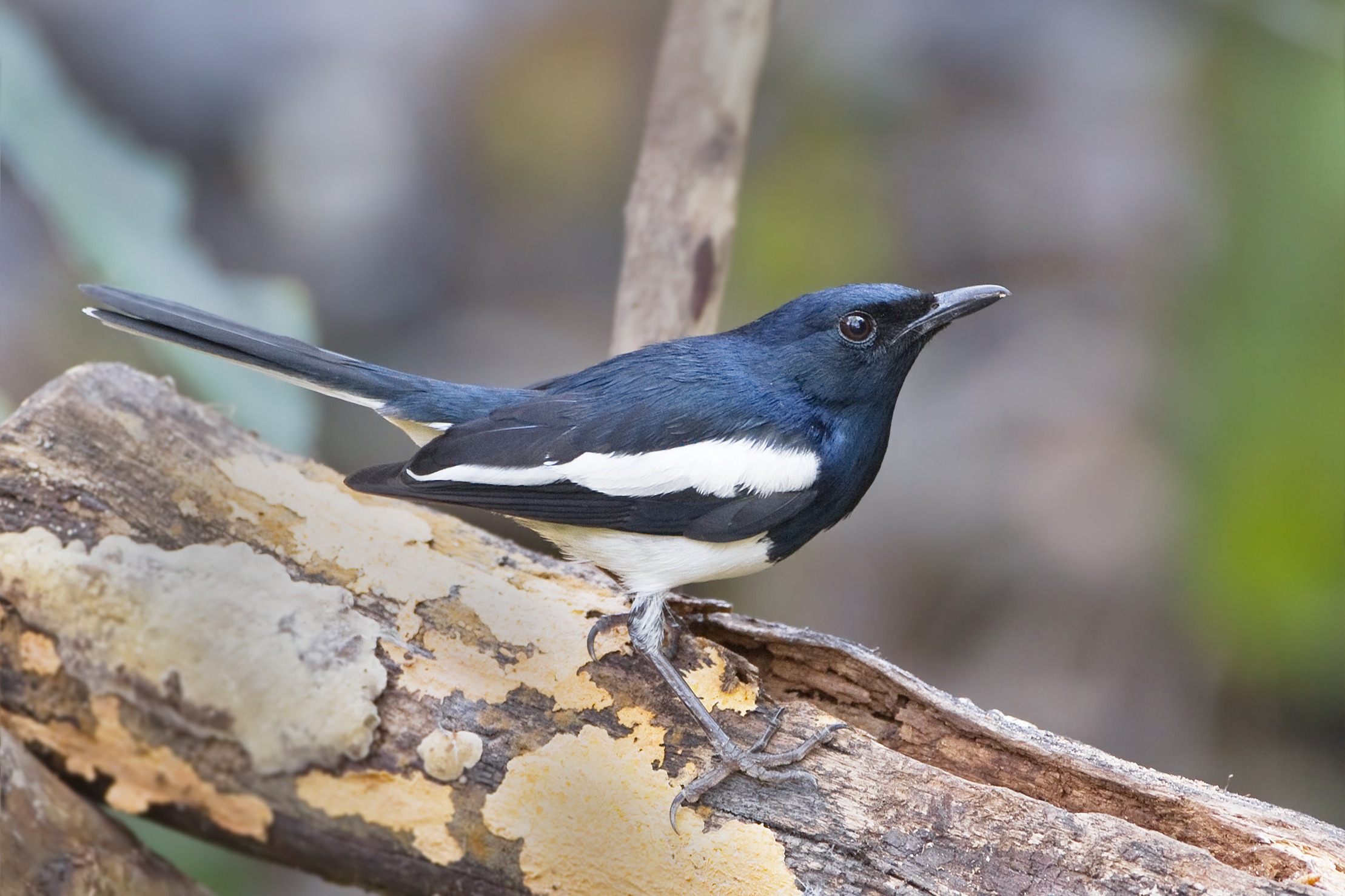 Oriental Magpie Robin (Copsychus saularis) male, Royal Agricultural Station, Ang Khang, Mon Pin, Chiang Mai, Thailand